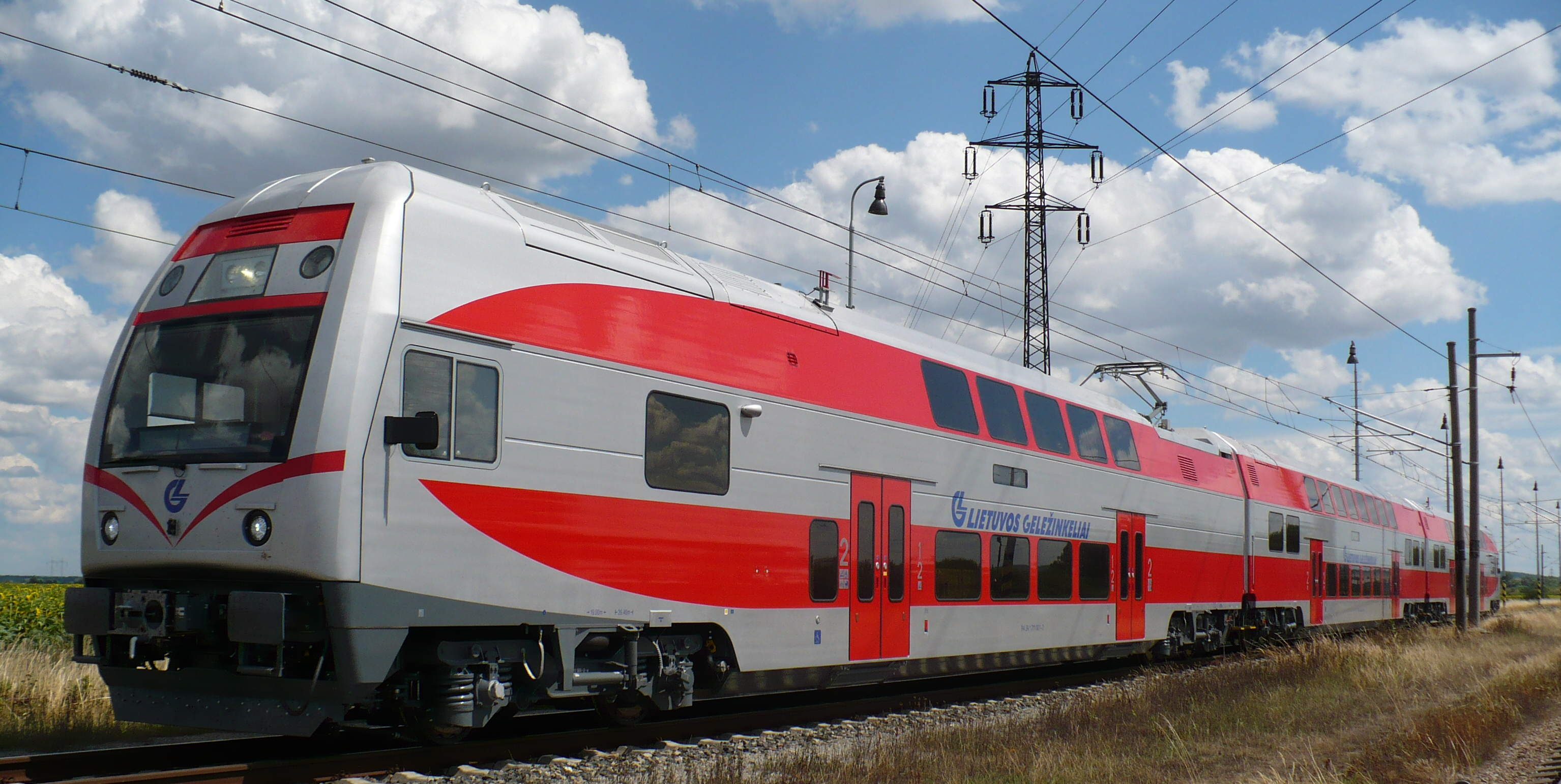 Elektrická jednotka 575 pro LG na Železničním zkušebním okruhu